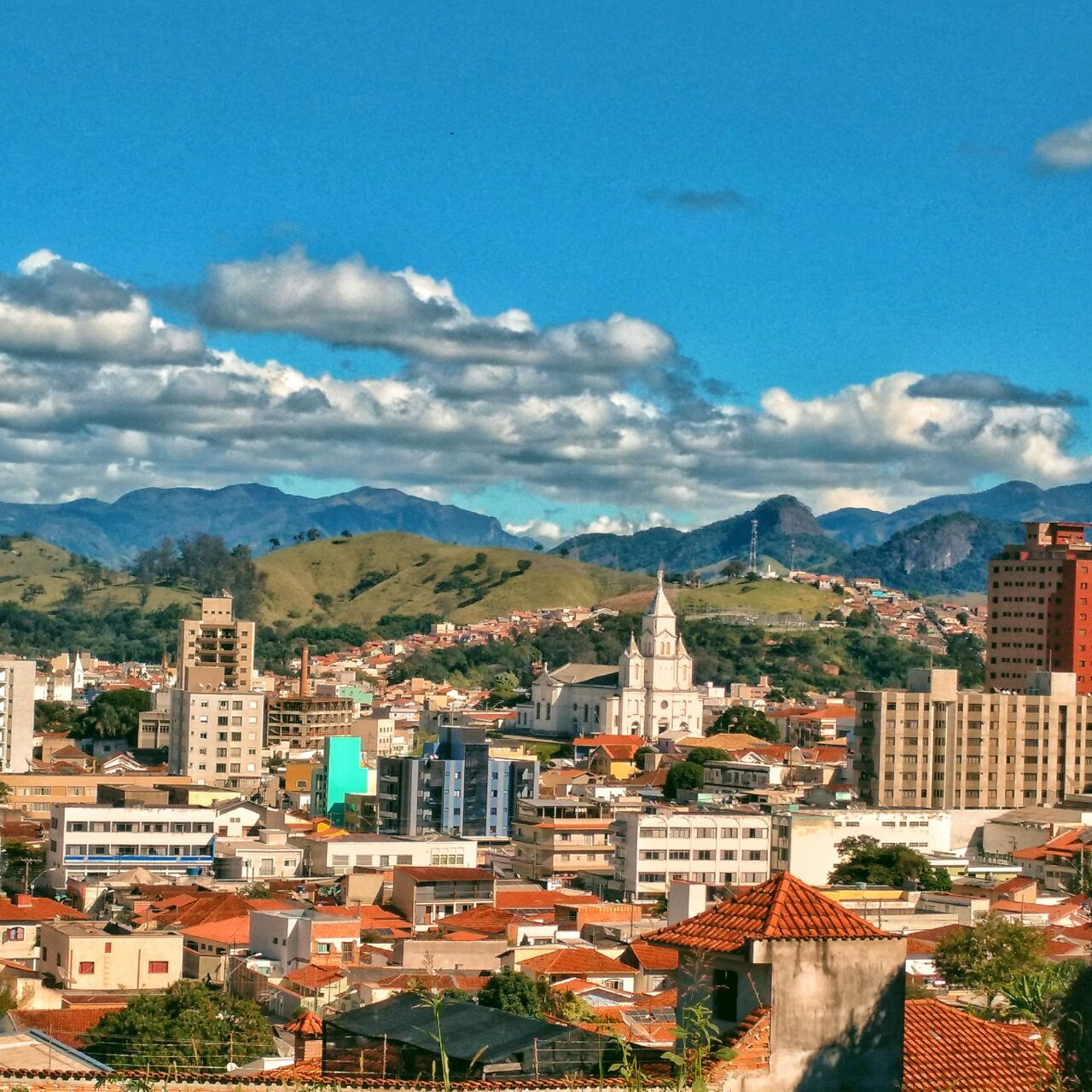 Cidade de Itajubá. 2017. Fonte: Evelim Lamaiara